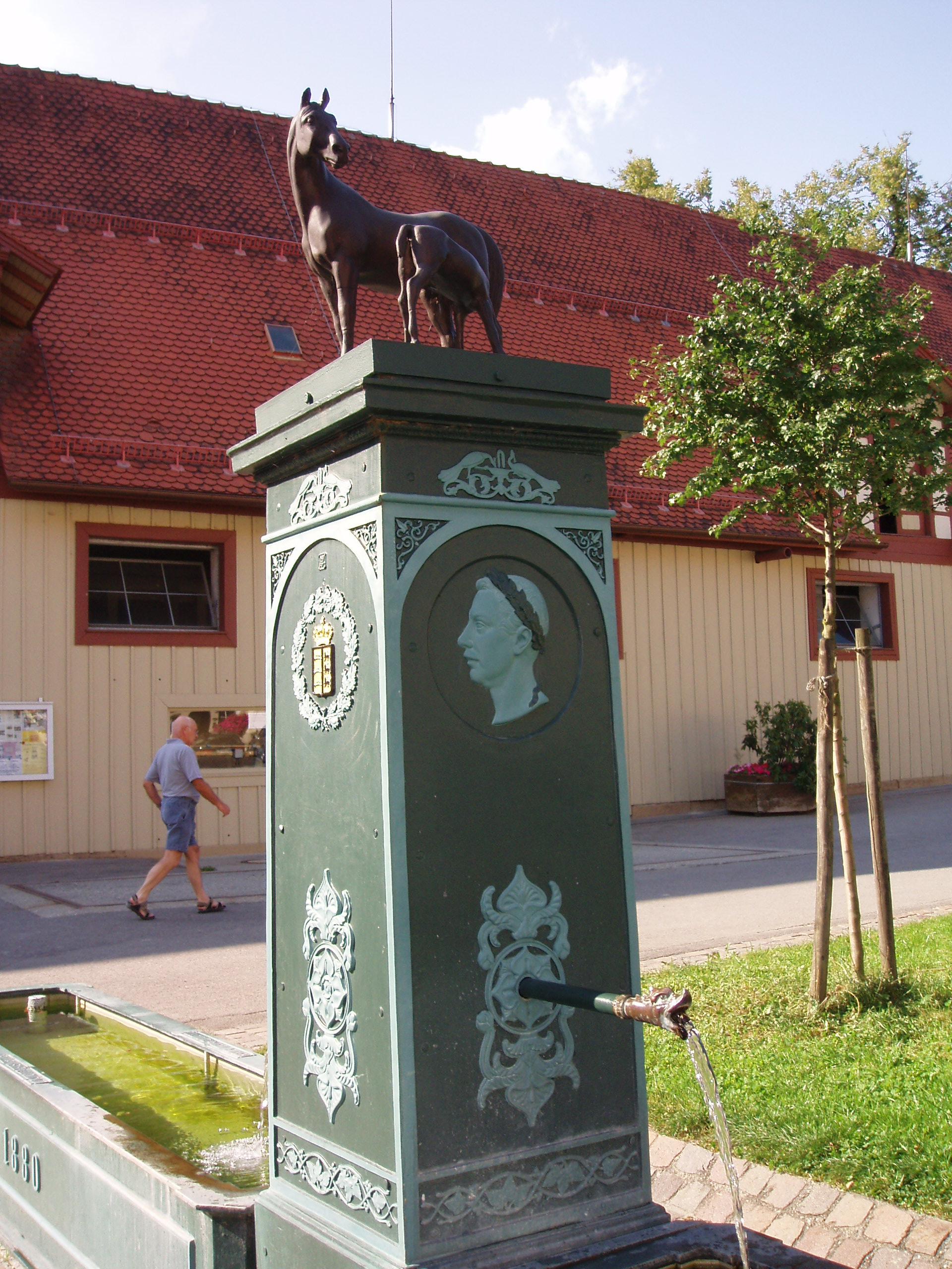 Der "Stutenbrunnen" im Haupt- und Landgestüt Marbach